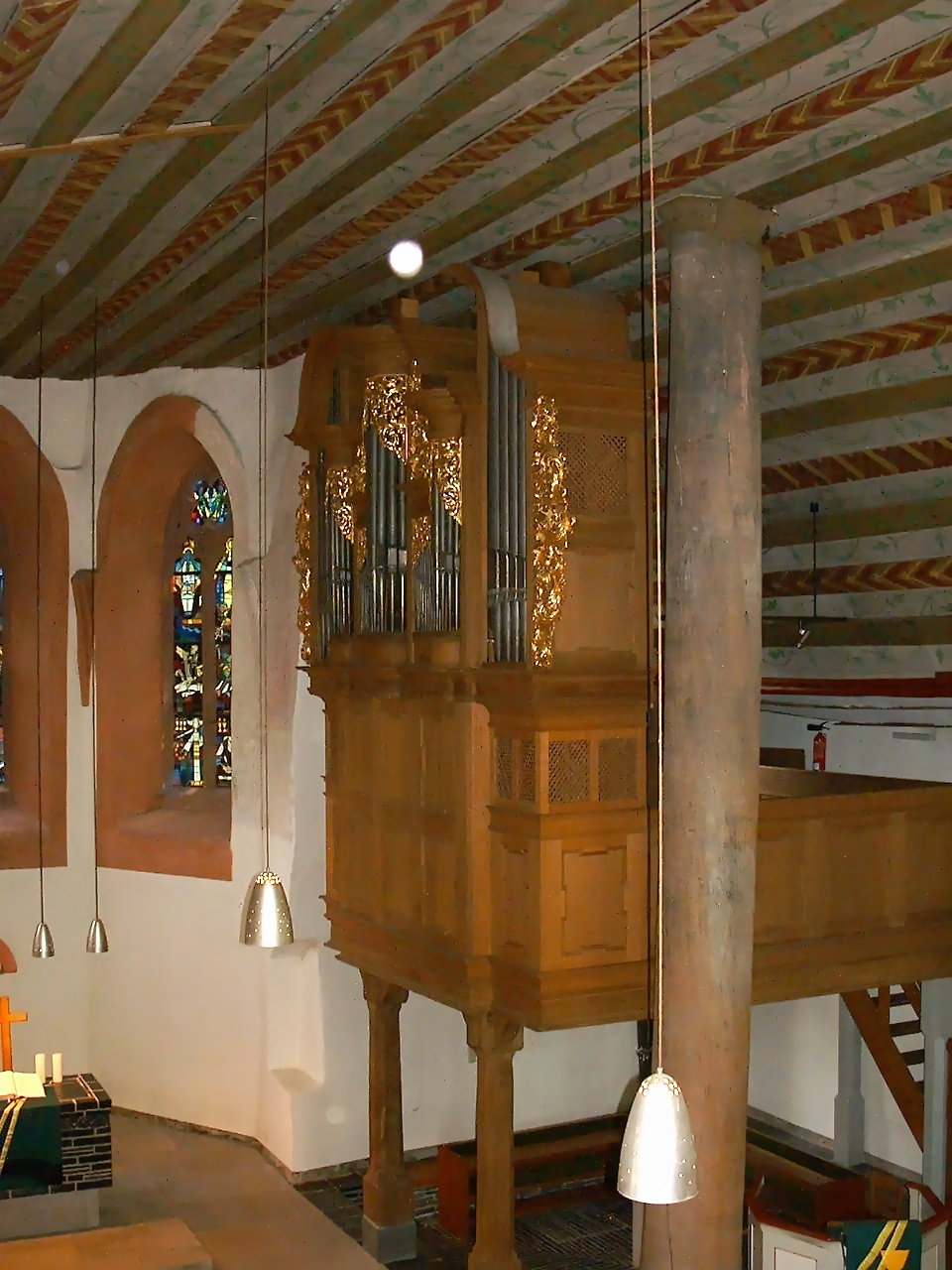 Evangelische Kirche Rhaunen, Stumm-Orgel